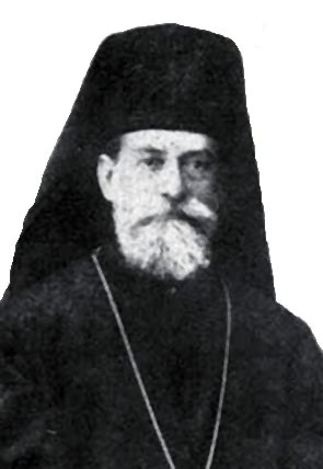 Vasile Mangra (n. 25 mai 1850, Săldăbagiu, comitatul Bihor - d. 14 octombrie 1918, Budapesta)